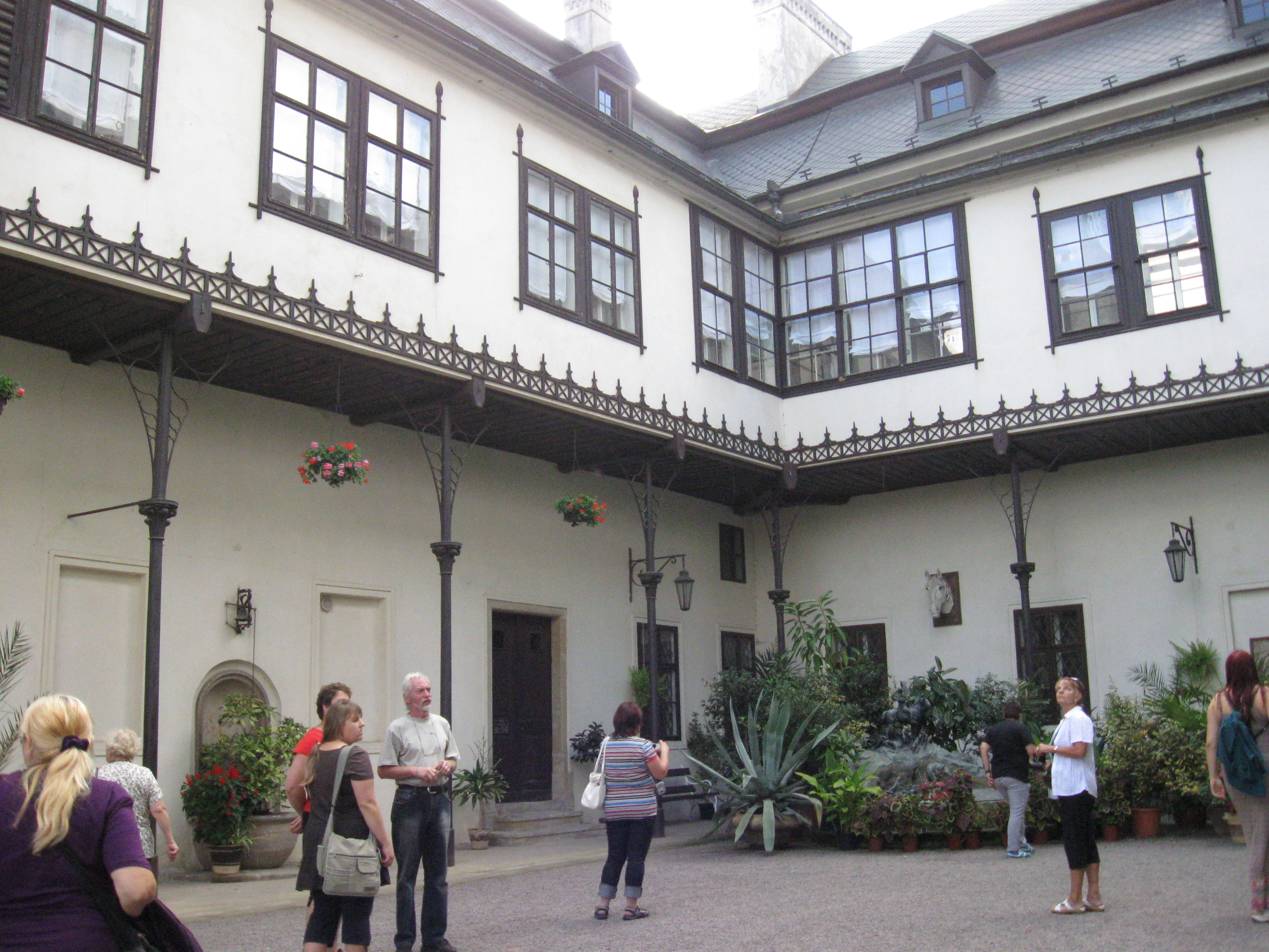 Zámek Slatiňany